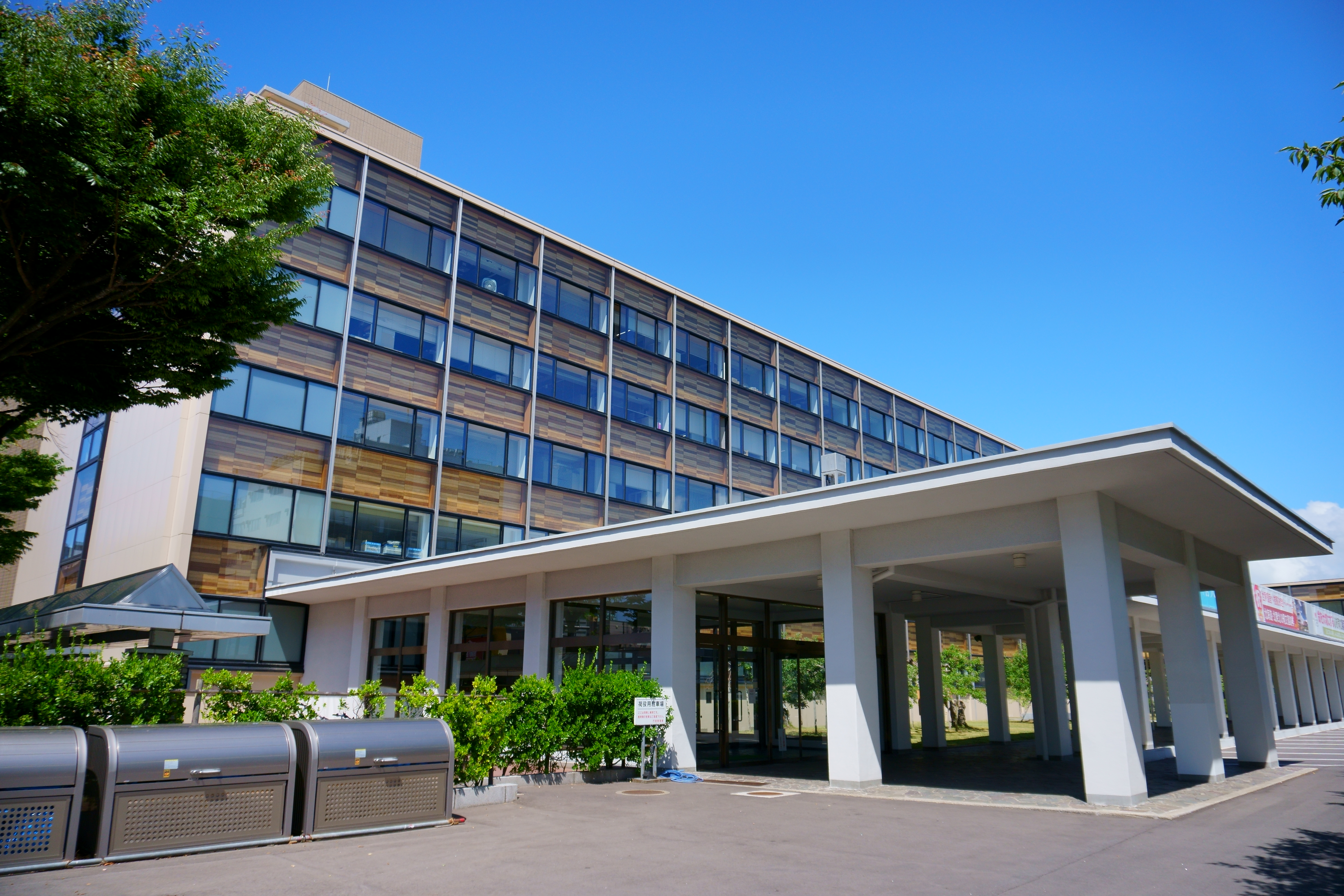 青森県庁舎。原設計は建築家・谷口吉郎（同じく建築家・谷口吉生の父）。2016年から2018年にかけて耐震補強と長寿命化のため、8階建てから6階建てへの減築工事が行われた。